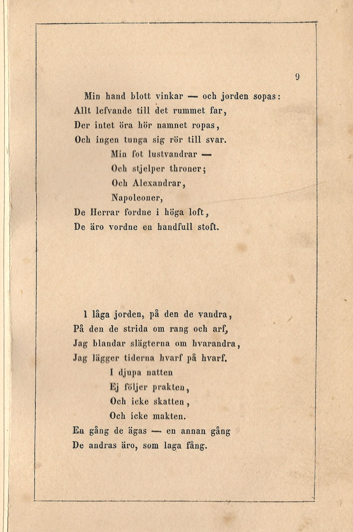 Sida 9 i Dödens Engel af Johan Olof Wallin, ny ilustrerad upplaga 1851